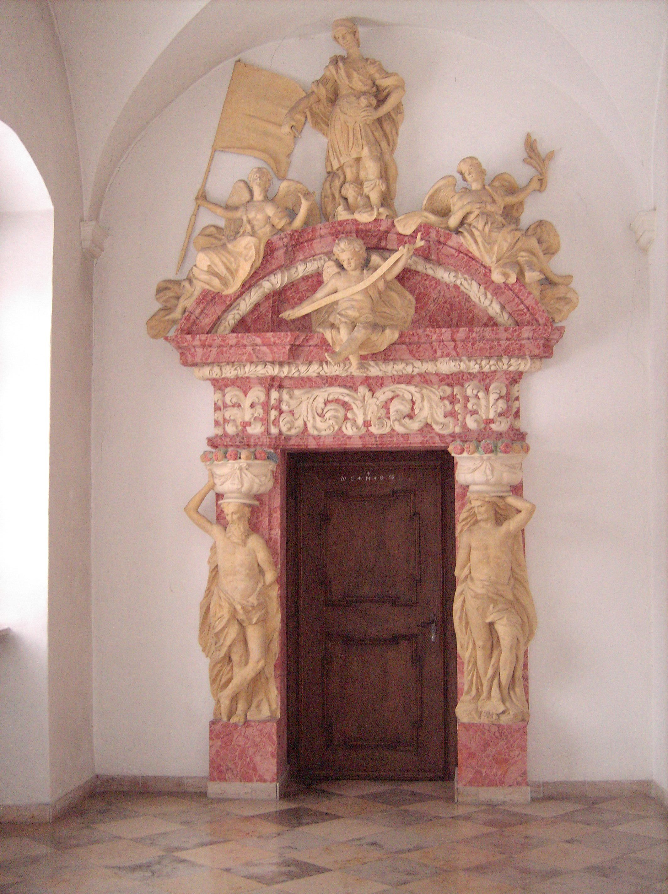 Kloster Niederaltaich, Türportal